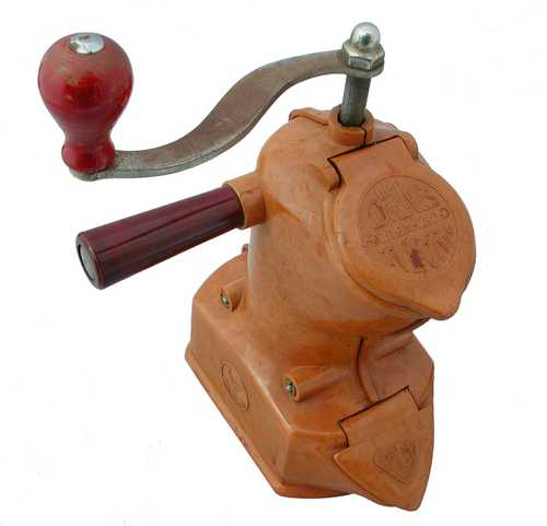 Moulin à café réalisé en Bakélite Pe De année 1935